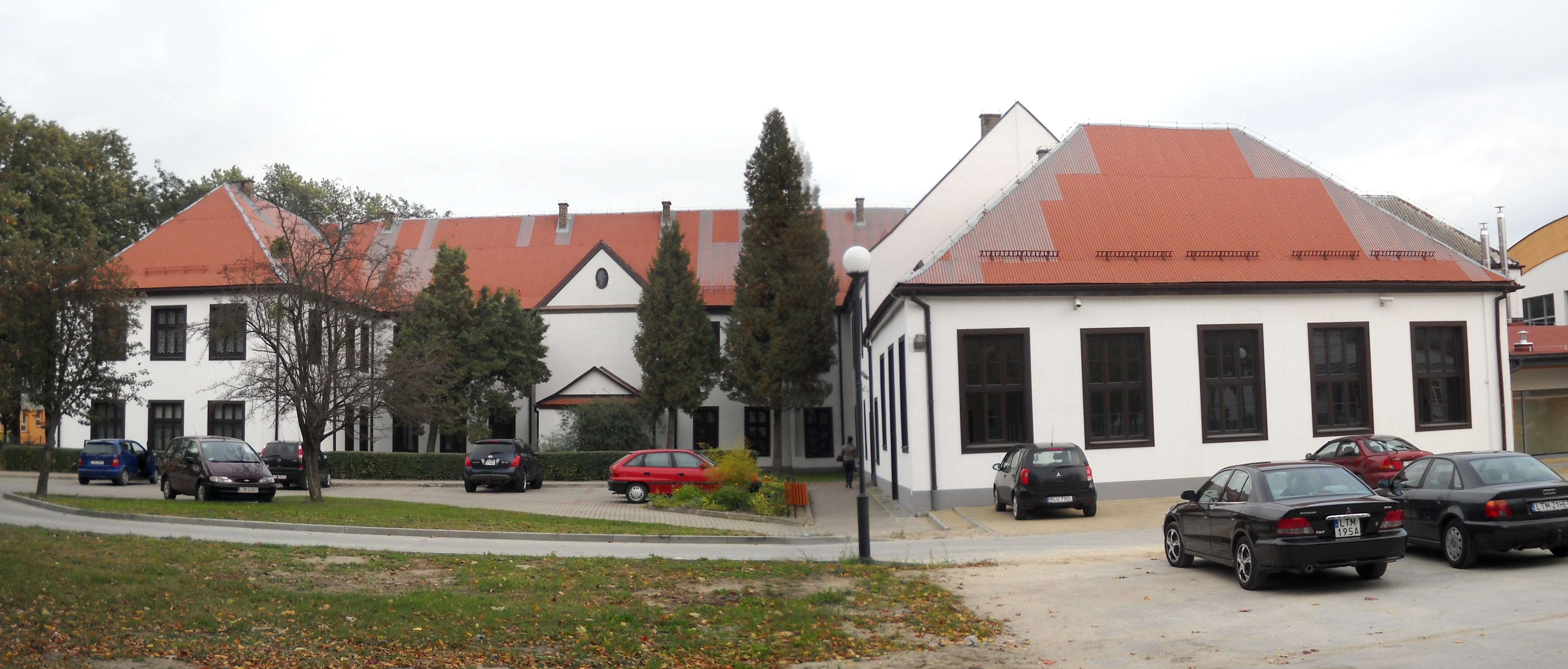 Tomaszów Lubelski, Zespół Szkół Nr 2 (zabytek nr rejestr. A/359 z 16.12.1986)